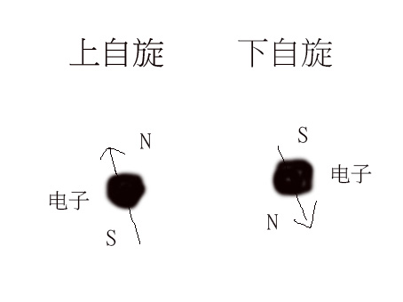 中文（香港）: 自旋状态2种